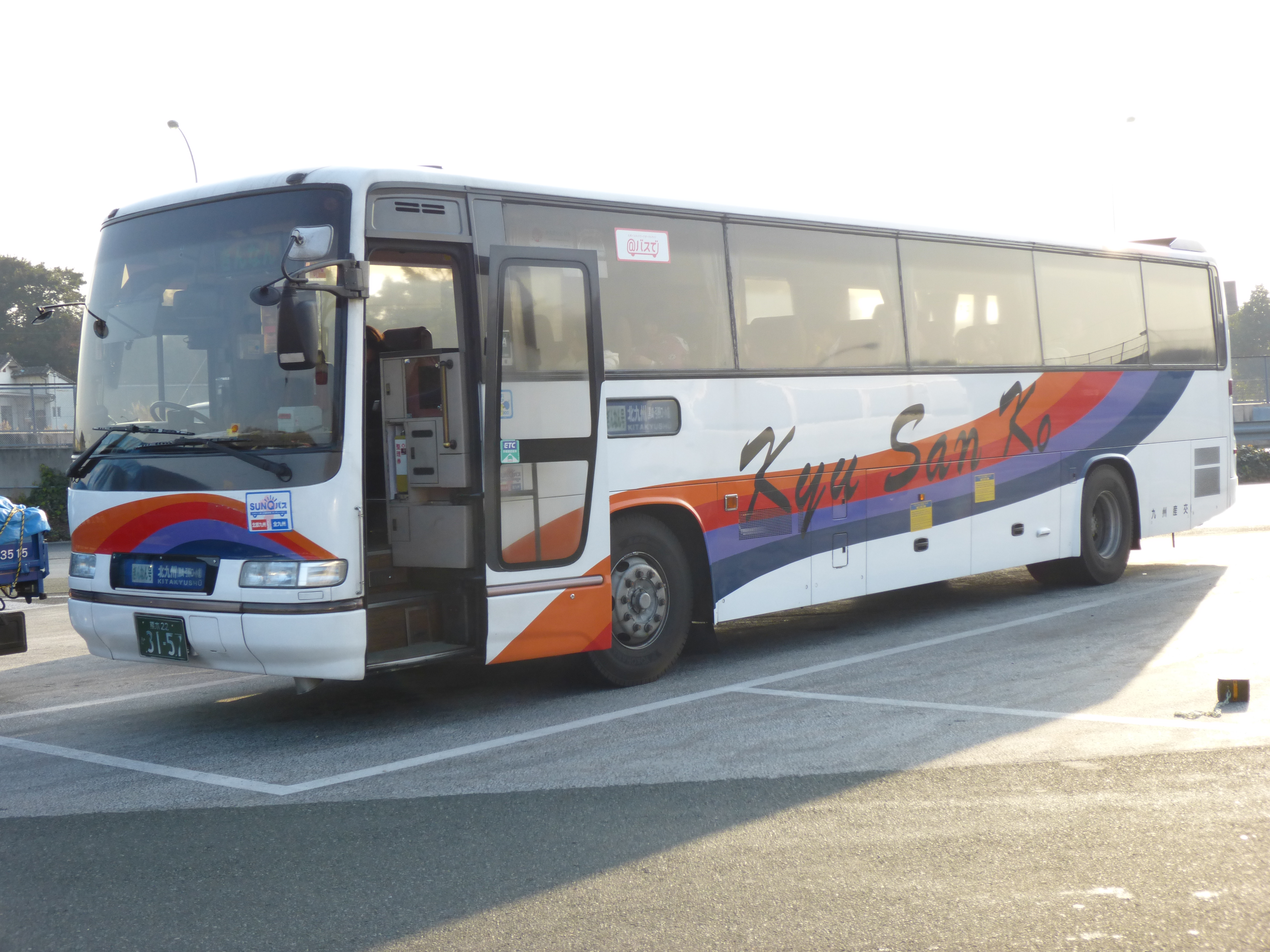 事業者：九州産交バス 登録番号：熊本22 か 3157 用途：乗合（高速） シャーシ: 日野 セレガ 年式: 1997年 撮影場所：広川サービスエリアにて